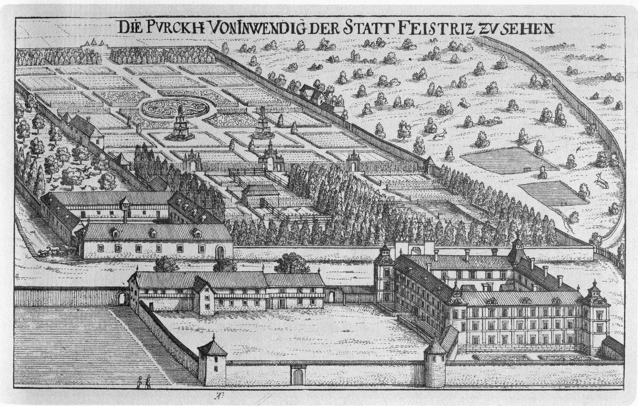 G. M. Vischers Käyserlichen Geographi, Topographia Ducatus Stiriae, Das ist: Eigentliche Delineation / und Abbildung aller Städte / Schlösser / Marcktfleck / Lustgärten / Probsteyen / Stiffter / Clöster und Kirchen / so es sich im Herzogthumb Steyrmarck befinden; Und anjetzo Umb einen billichen Preyß zu finden seynd Bey Johann Bitsch Universitäts Buchhandlern / Auff dem Juden=Platz bey der guldenen Saulen. Graz 1681 Die Nummerierung der Dateien folgt der alphabetischen Reihung der Ortsnamen und entspricht nicht dem Vischer-Register